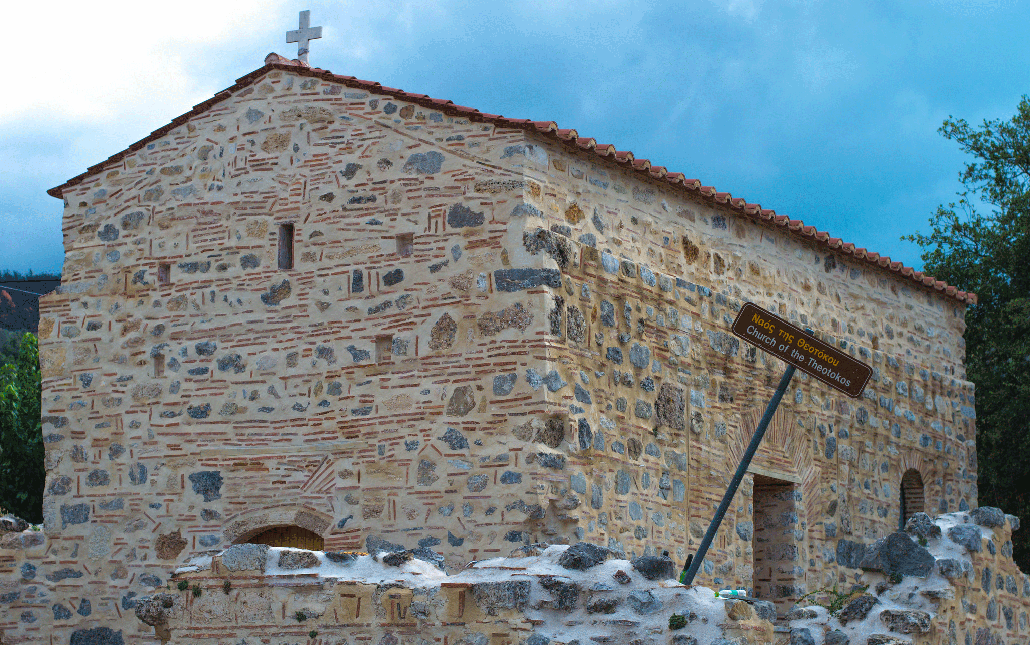 Ναός Θεοτόκου